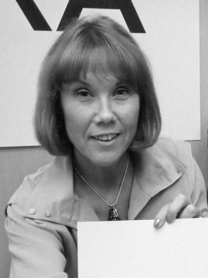 V.l.n.r. Letty Kosterman, Henk Spaan, Sonja Barend en voorzitter Albert van den Heuvel 26 september 1983